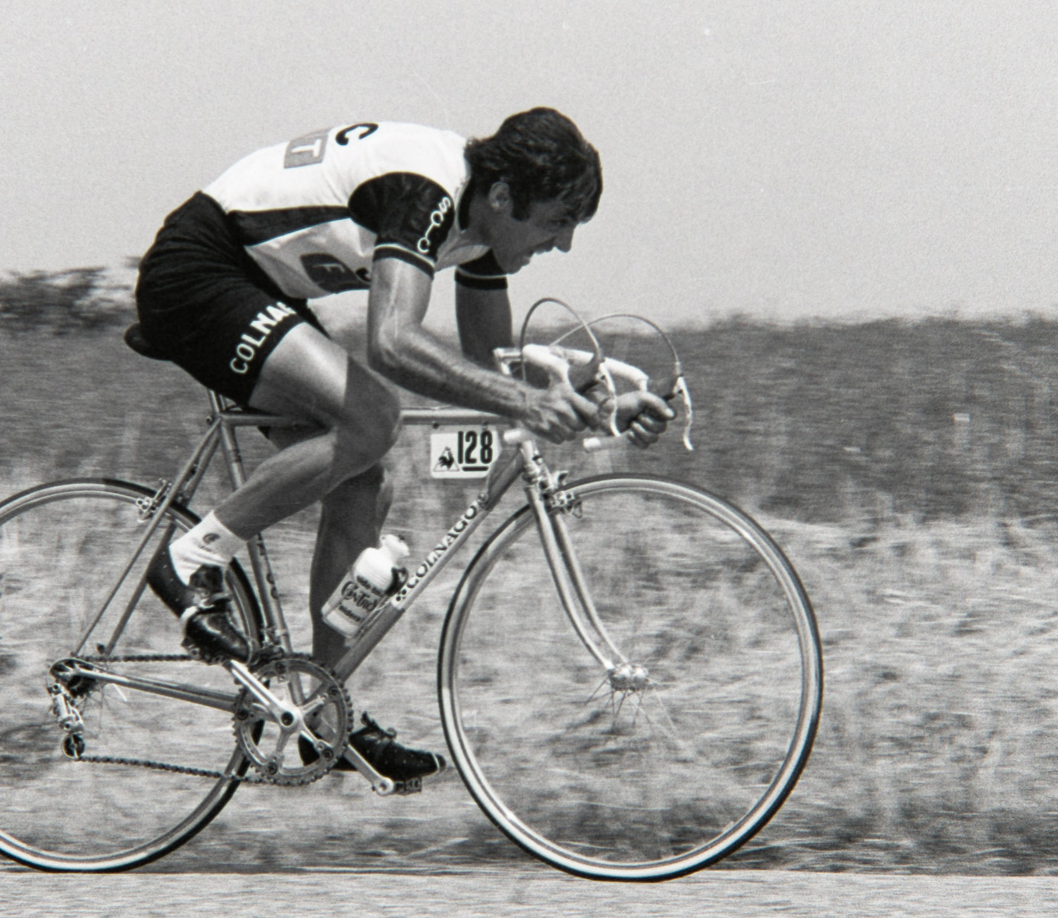 Walter Riccomi durant le Tour de France 1976. Photographie : René Milanese